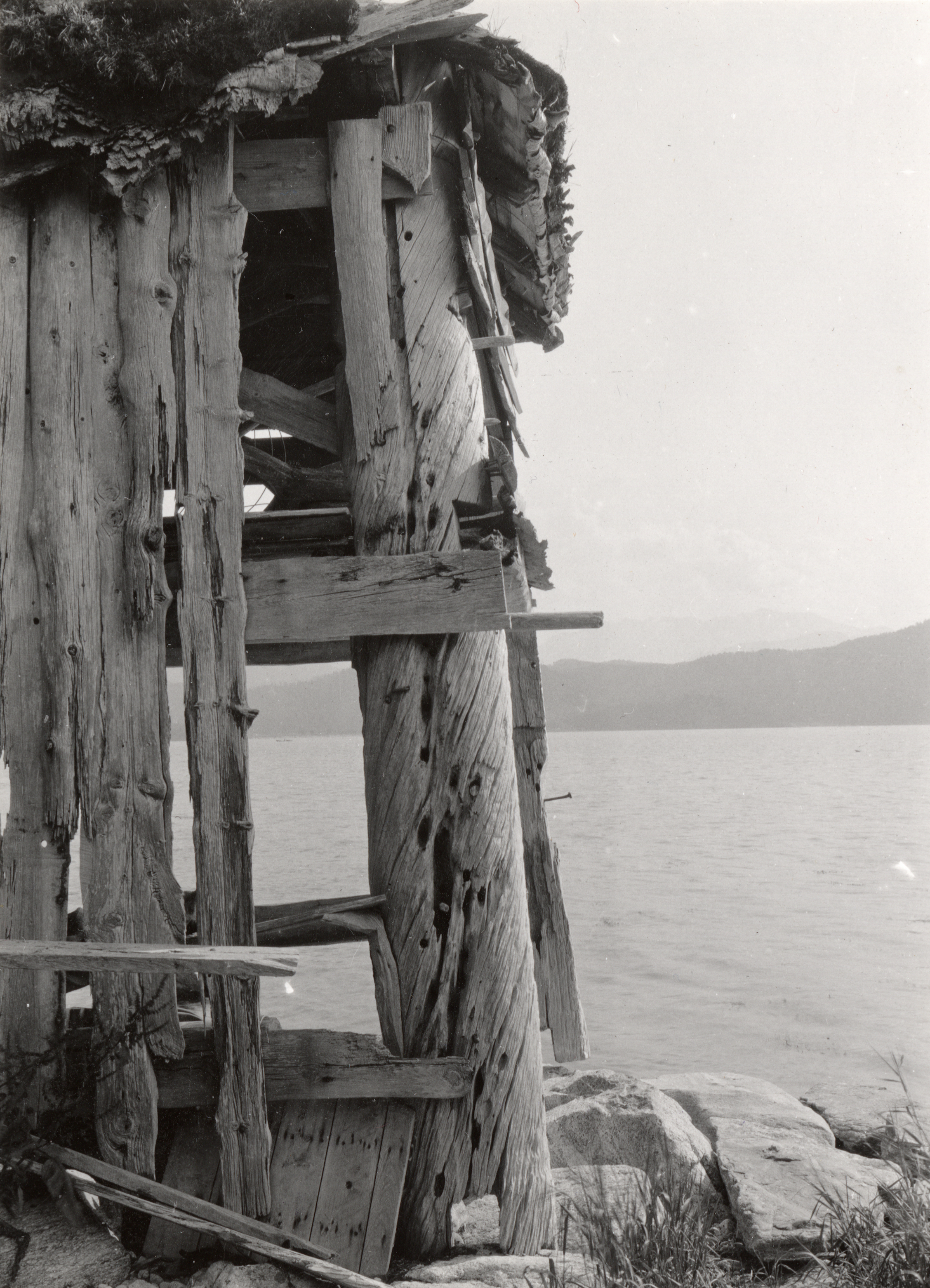 Ørskog kirke i Ørskog, Møre og Romsdal Rester av stolper fra Ørskog stavkirke brukt til bygging av naust. Stavkirkedelene befinner seg i dag på Sunnmøre museum.